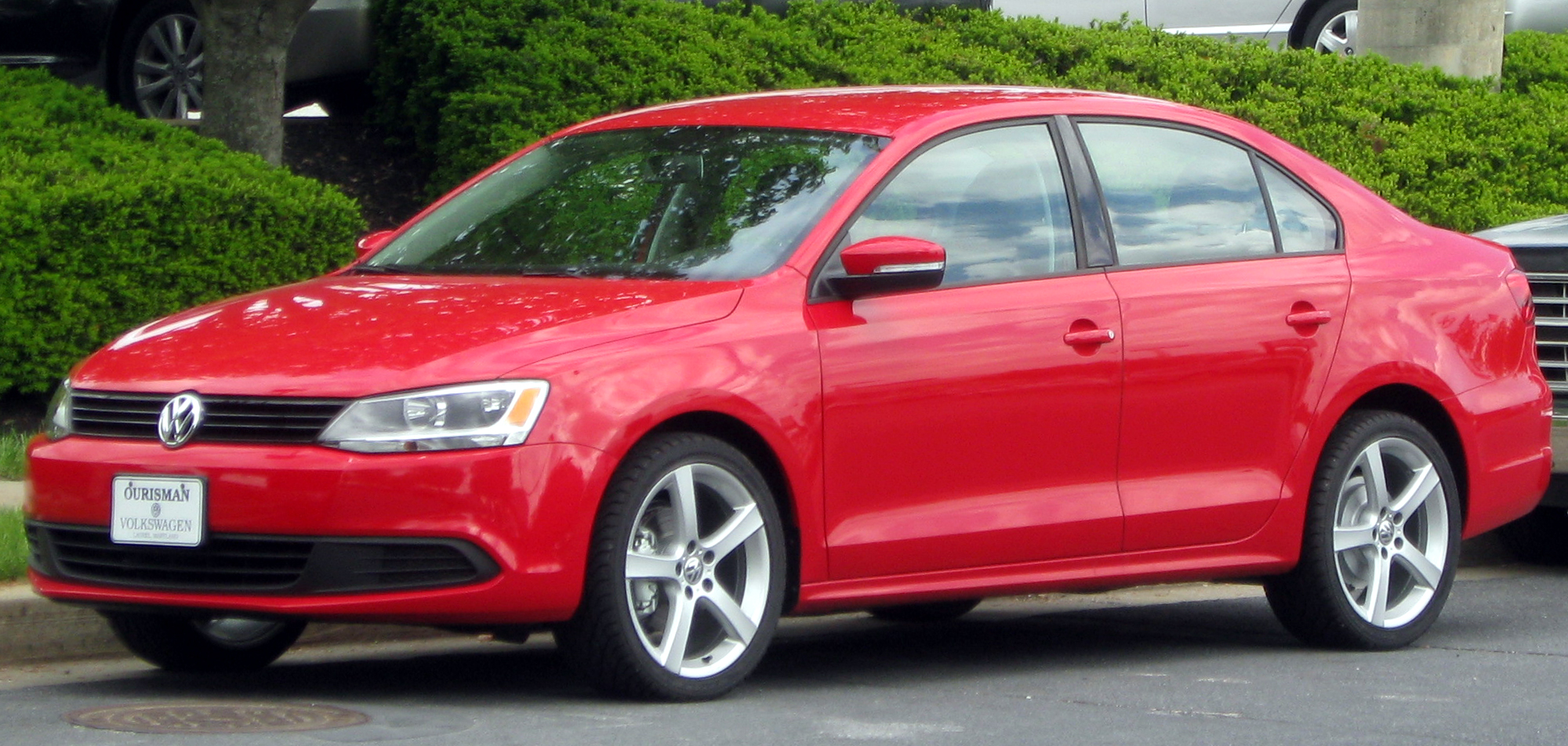 2011 Volkswagen Jetta photographed in Clarksville, Maryland, USA.